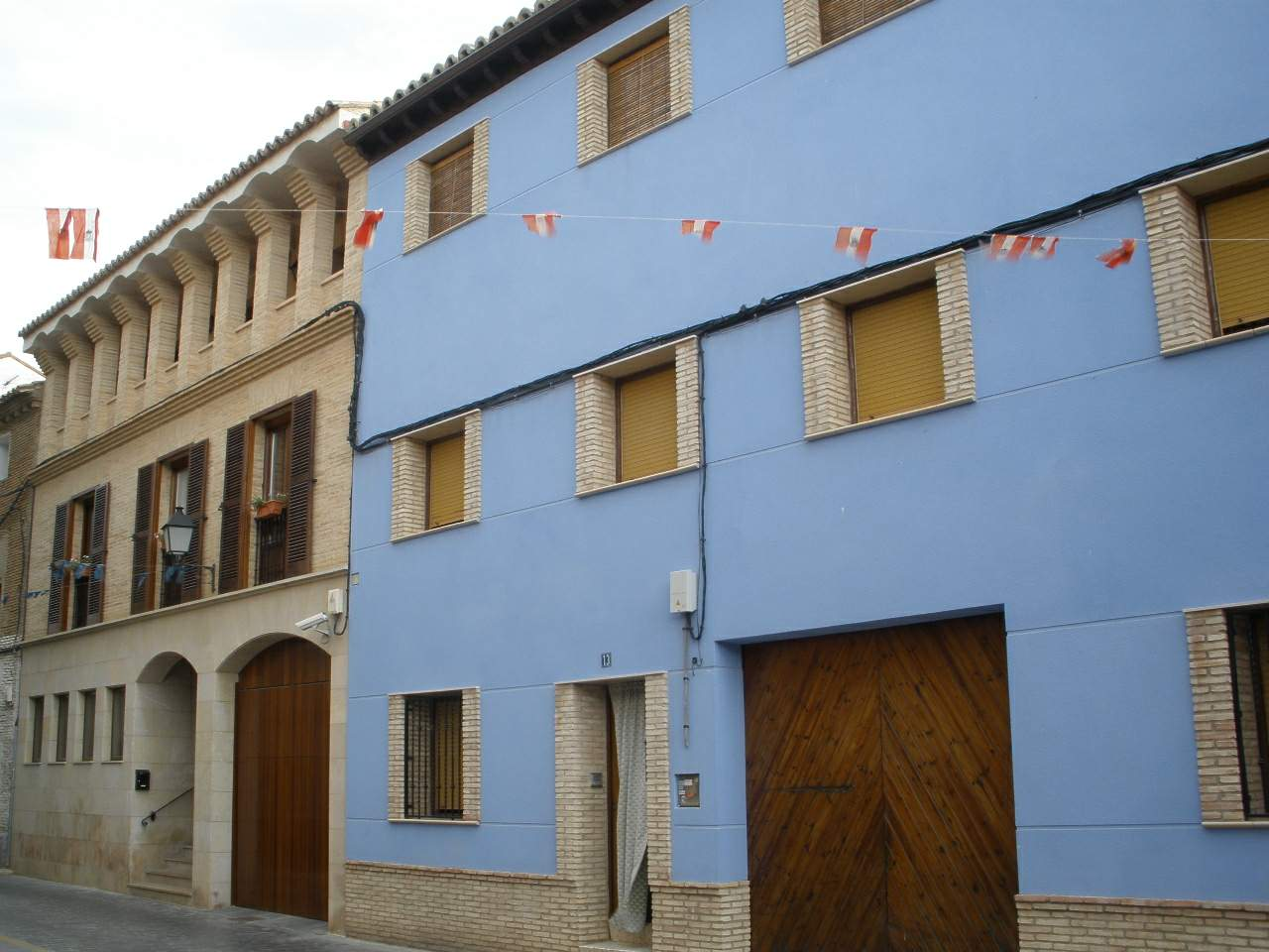 Utebo (Zaragoza)